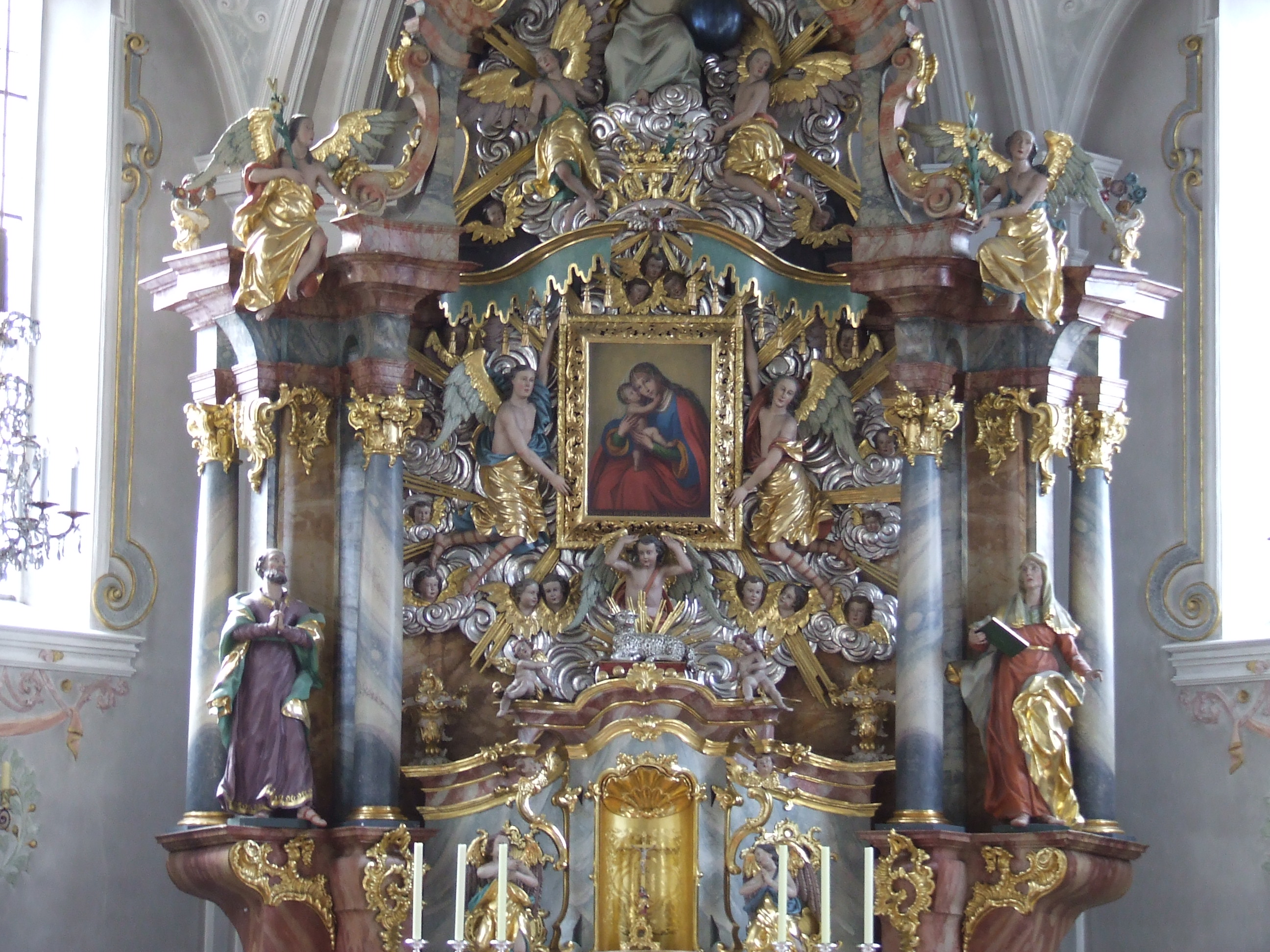 Stadt Neumarkt in der Oberpfalz, Kirche/Wallfahrtskirche MariaHilf innen / Barocker Hochaltar mit Gnadenbild Maria Hilf